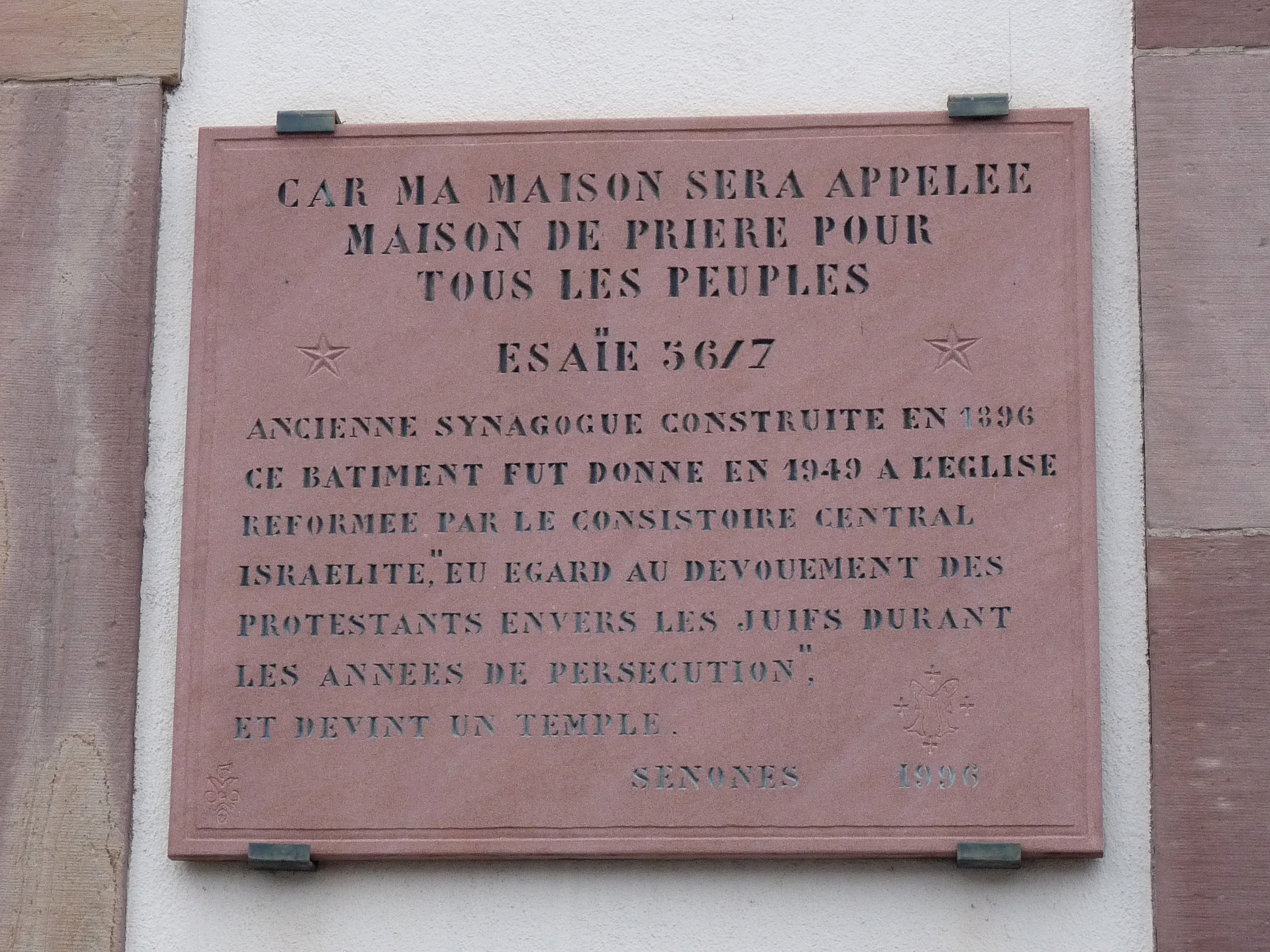 Senones (Vosges) : Ancienne synagogue construite en 1896. Le bâtiment fut donné à l'Eglise réformée en 1949.